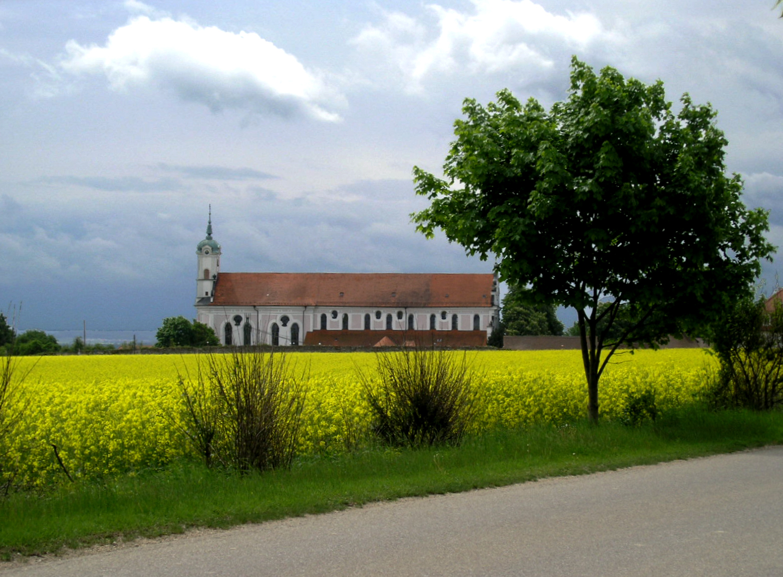 Klosterkirche Oberelchingen Pfarr-und Wallfahrtskirche St. Peter und Paul Date: 2006-04-18